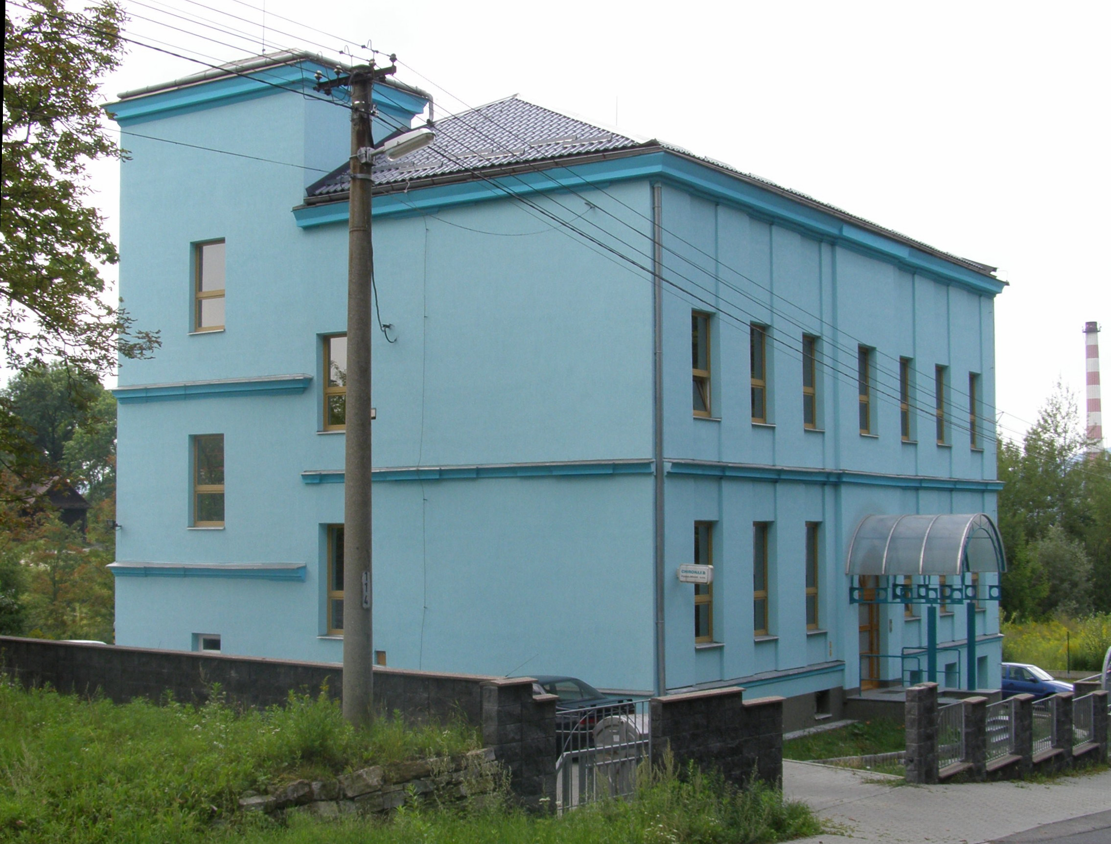 Budova bývalé židovské školy ve Frýdku-Místku, ulice Revoluční